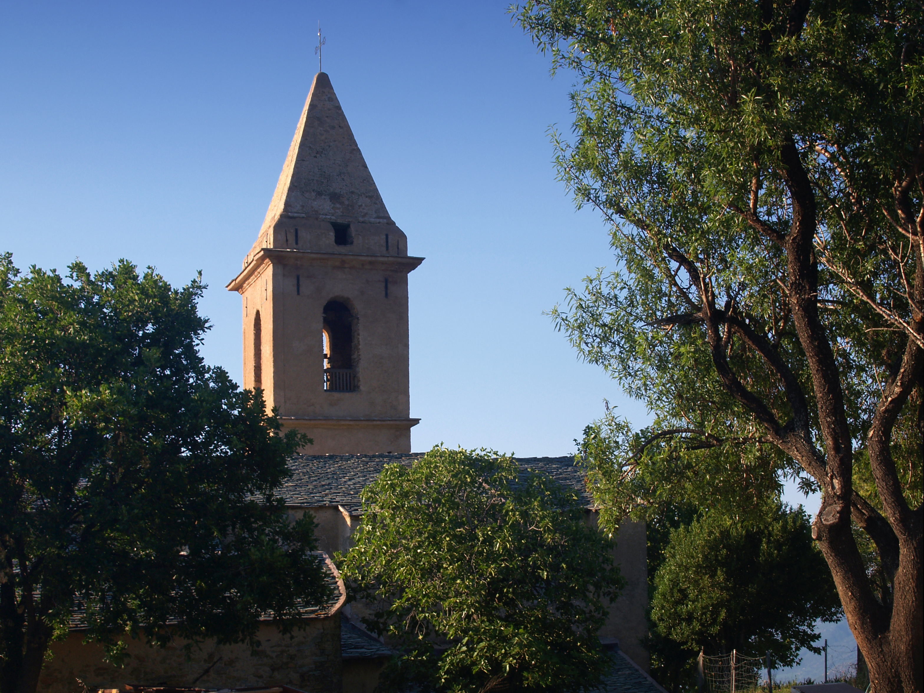 Rapale (Corse) - Église Santa Maria Assunta